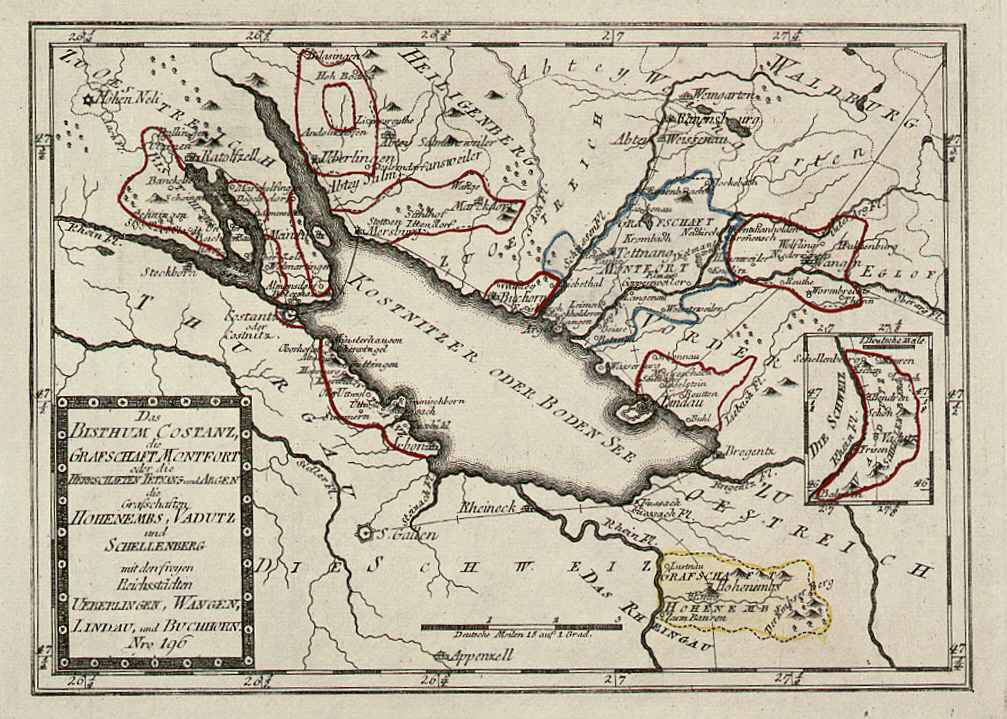 Das Bisthum Costanz, die Grafschaft Montfort oder die Herrschaften Tetnang und Argen die Grafschaften Hohenembs, Vadutz und Schellenberg mit den freyen Reichsstädten Ueberlingen, Wangen, Lindau und Buchhorn. Nro. 196. Kolorierter Kupferstich